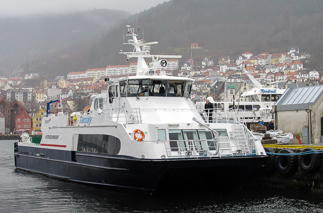 MS Tansøy på Strandkaien i Bergen i 2012.